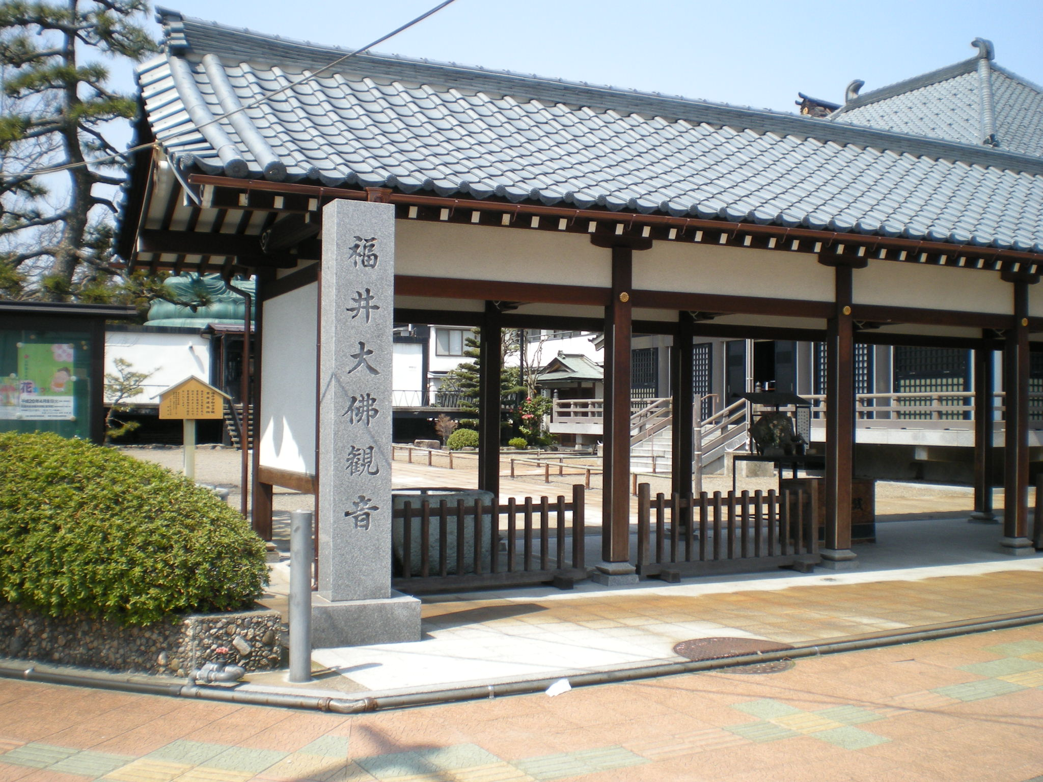 福井大仏観音